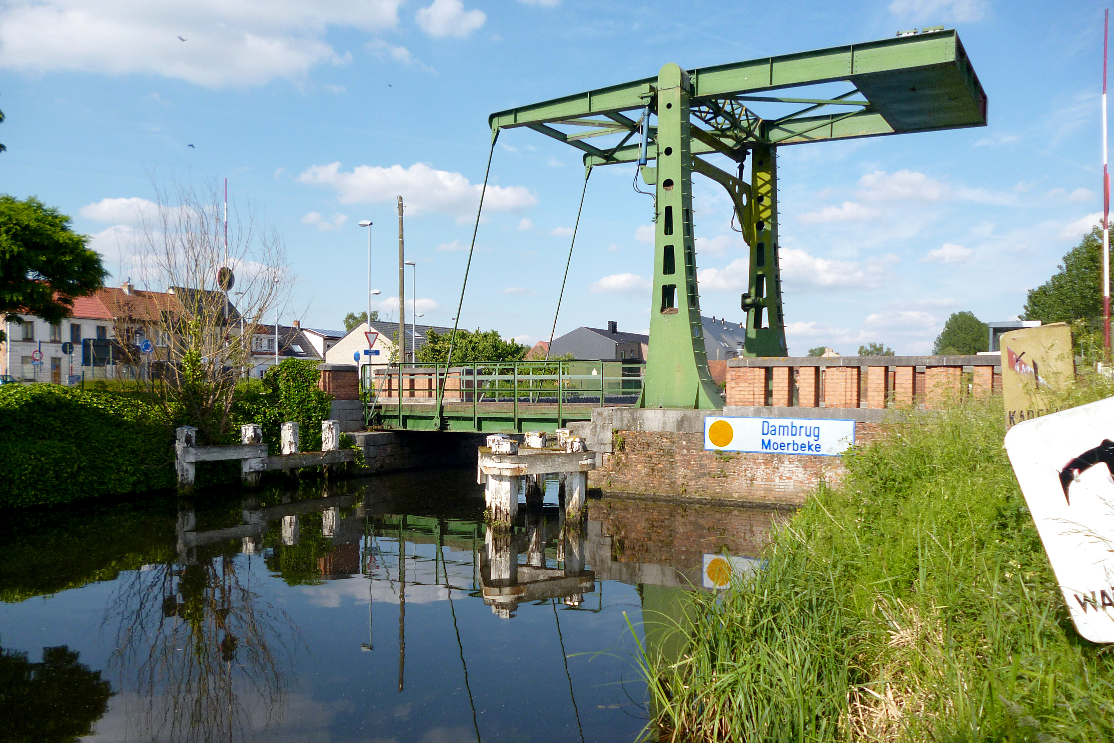 Dambrug Moerbeke